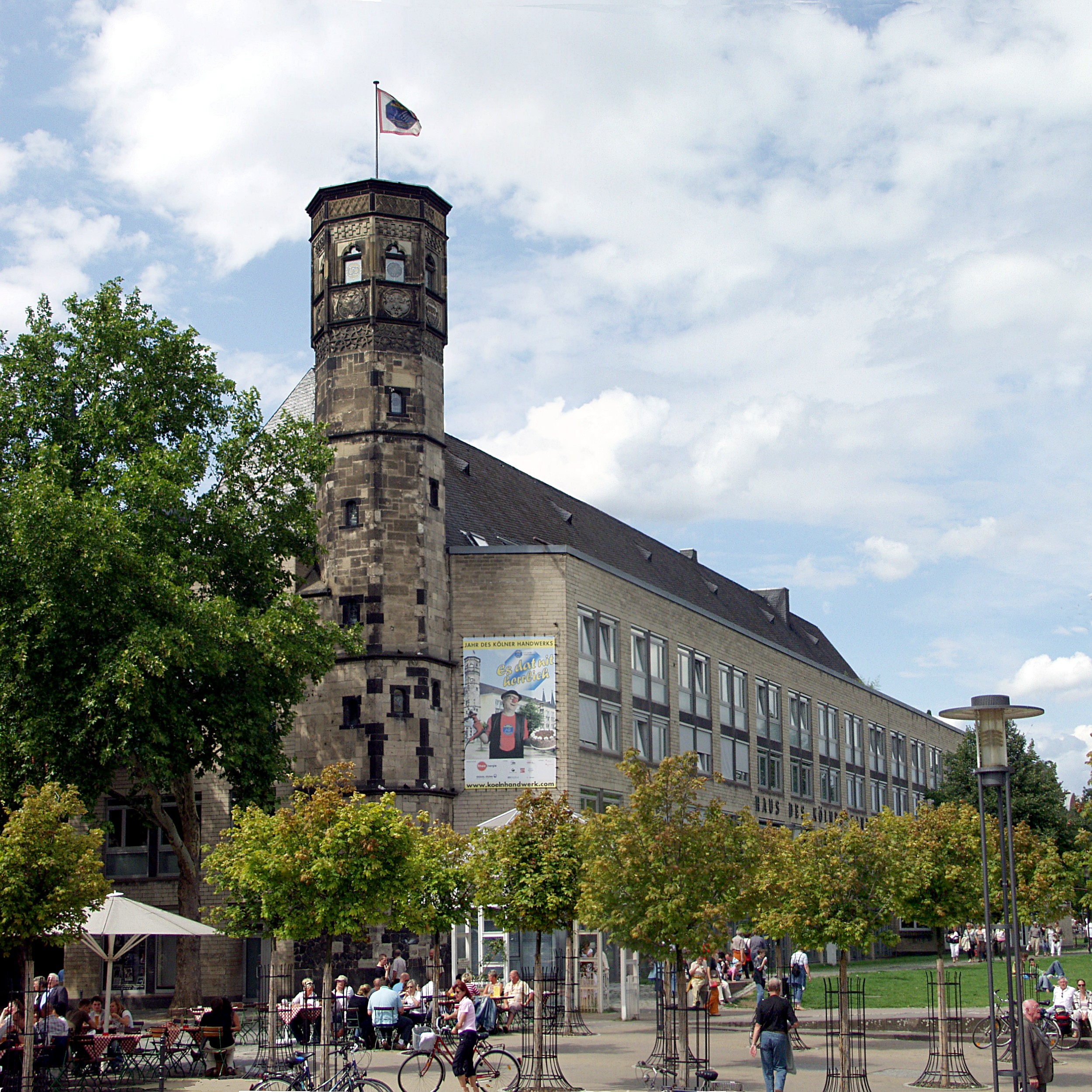 Stapelhaus in Köln, Ansicht von Süden This is a photograph of an architectural monument.